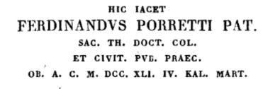 dalla Biografia degli scrittori padovani di Giuseppe Vedova